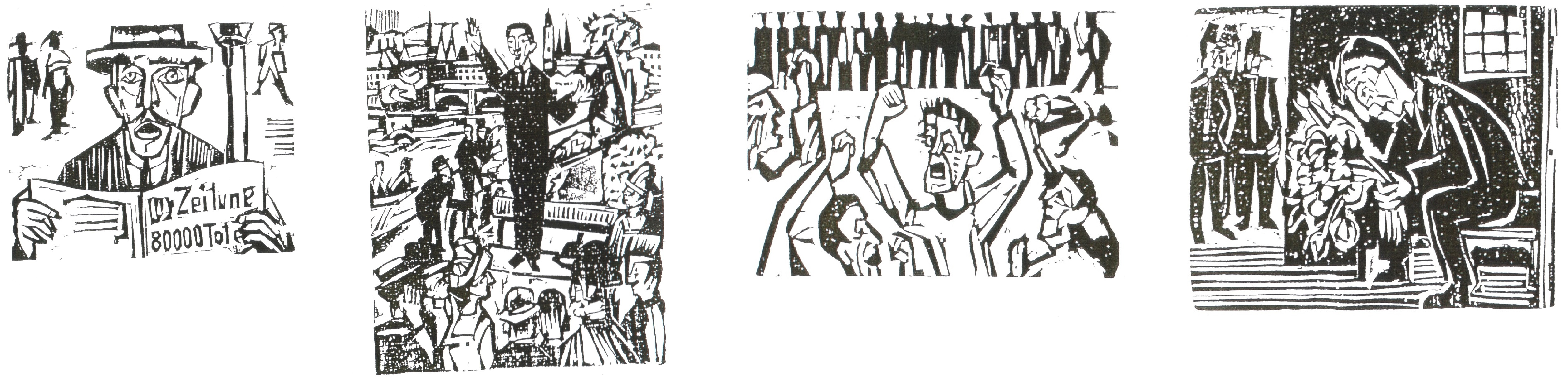 Illustration im Buch "Neben der Heerstrasse" zur Erzählung "Der Friedensapostel" erstellt durch Ernst Ludwig Kirchner zeigt die Geschichte von Max Daetwyler (1886 - 1978)